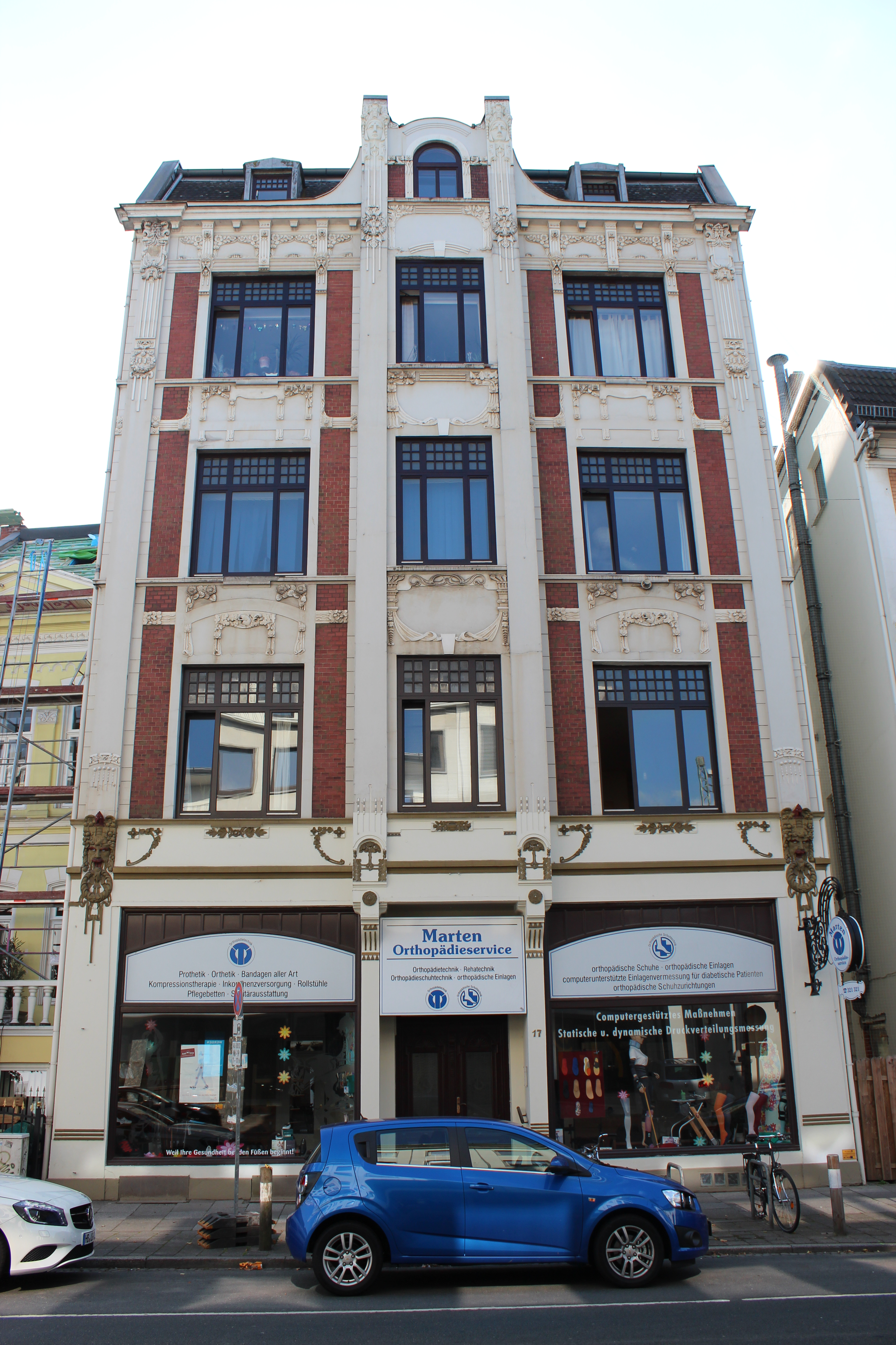 Eisschrank- und Badeapparatefabrik Laudel in Bremen, Außer der Schleifmühle 17Das abgebildete Objekt ist ein geschütztes Kulturdenkmal in der Freien Hansestadt Bremen, mit der Nr. 0097 beim Landesamt für Denkmalpflege registriert.